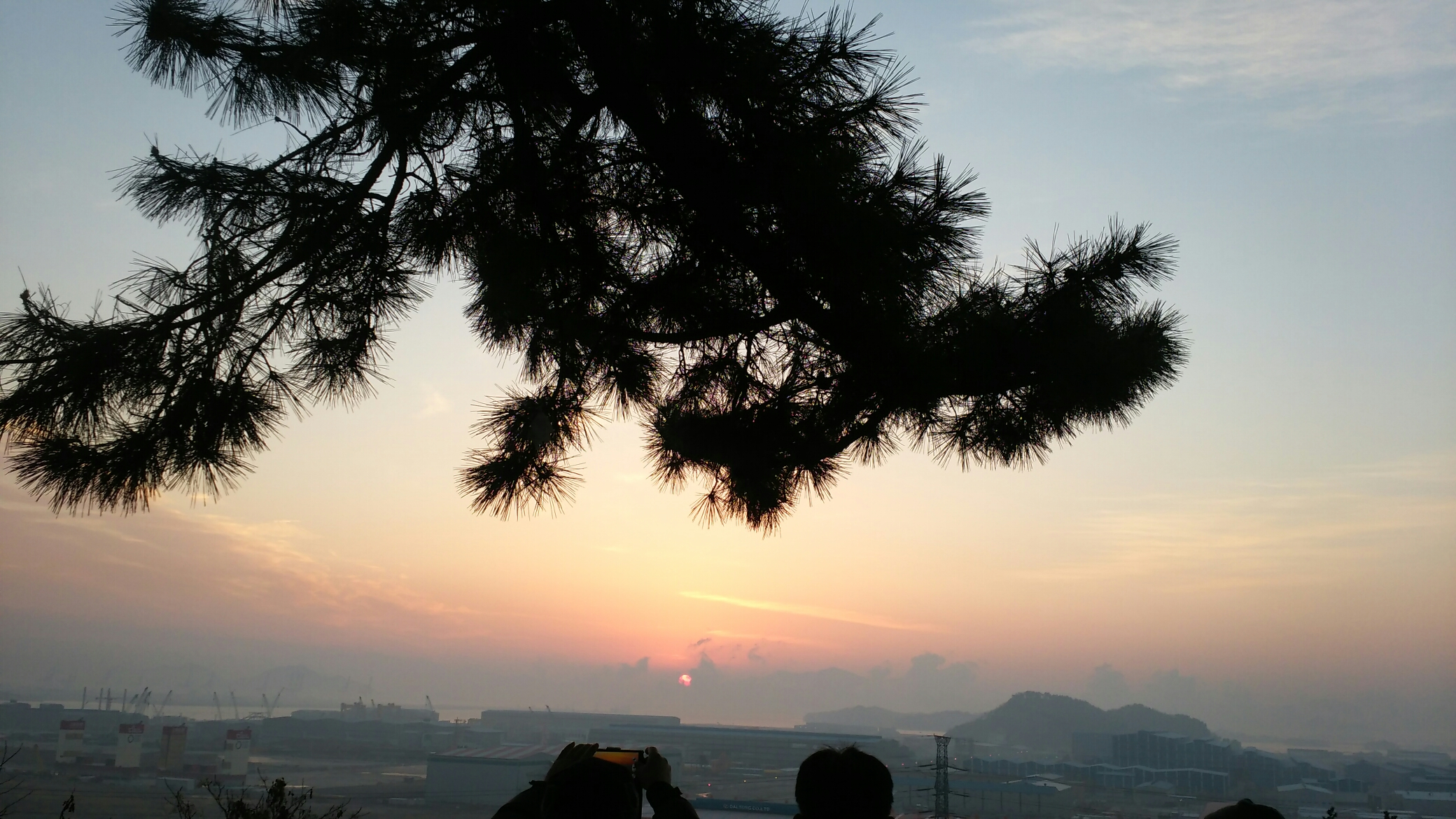 2017년 1월 1일 순천왜성 해돋이